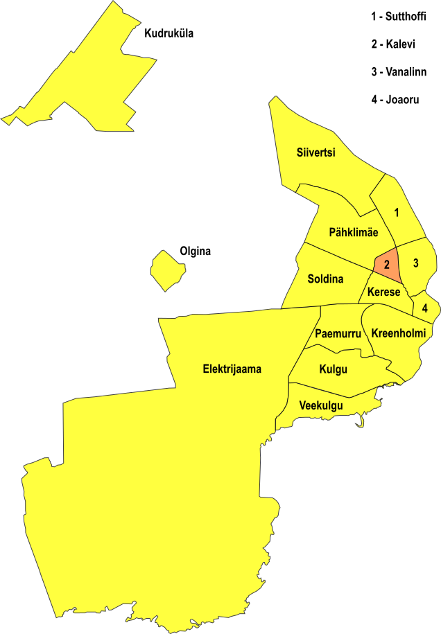 Narva linnaosa Kalevi